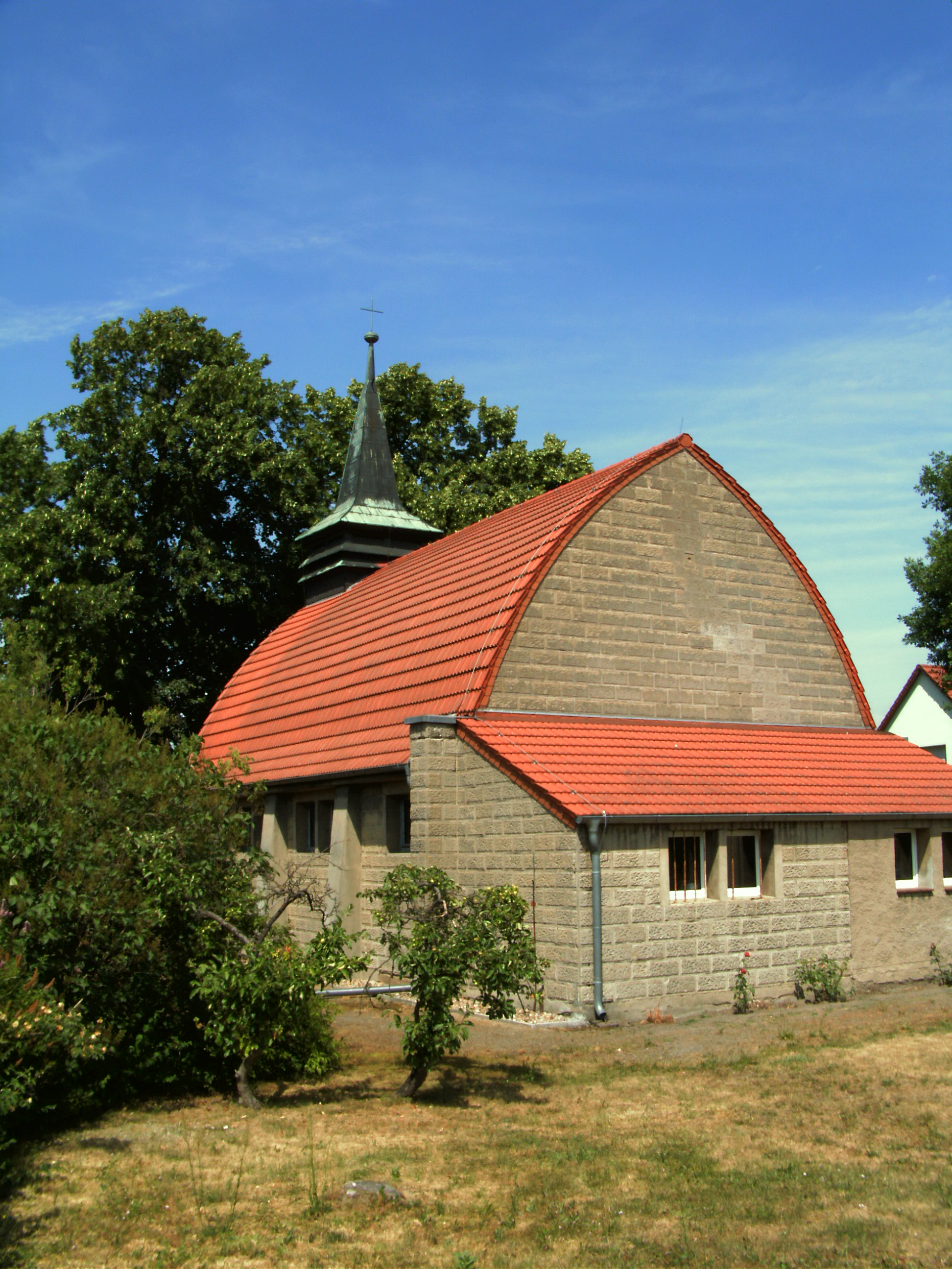 Katholische Kirche St. Bernhard in Goldbeck (2013 geschlossen).